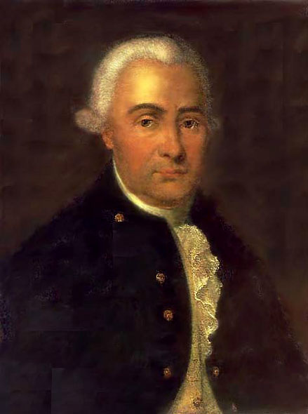 Self-portrait